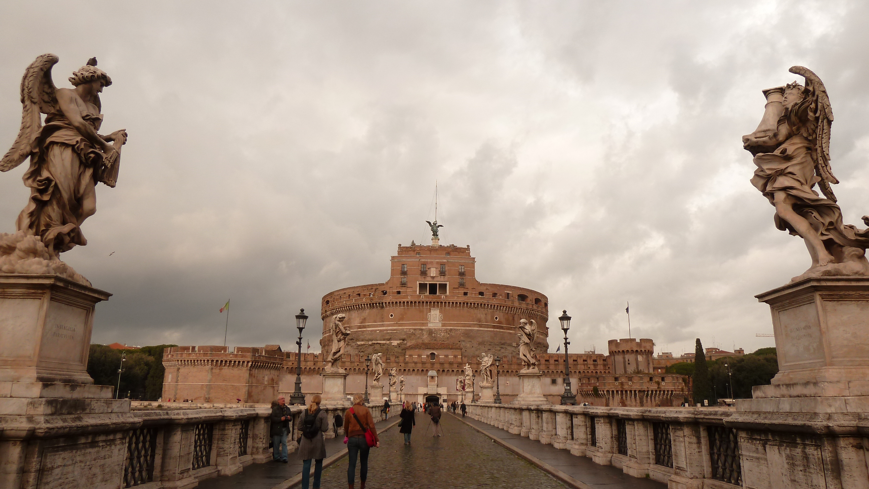 Construido como mausoleo para Adriano, después fue utilizado como fortaleza por los papas. Hay un puente que une directamente al castillo con el Vaticano.